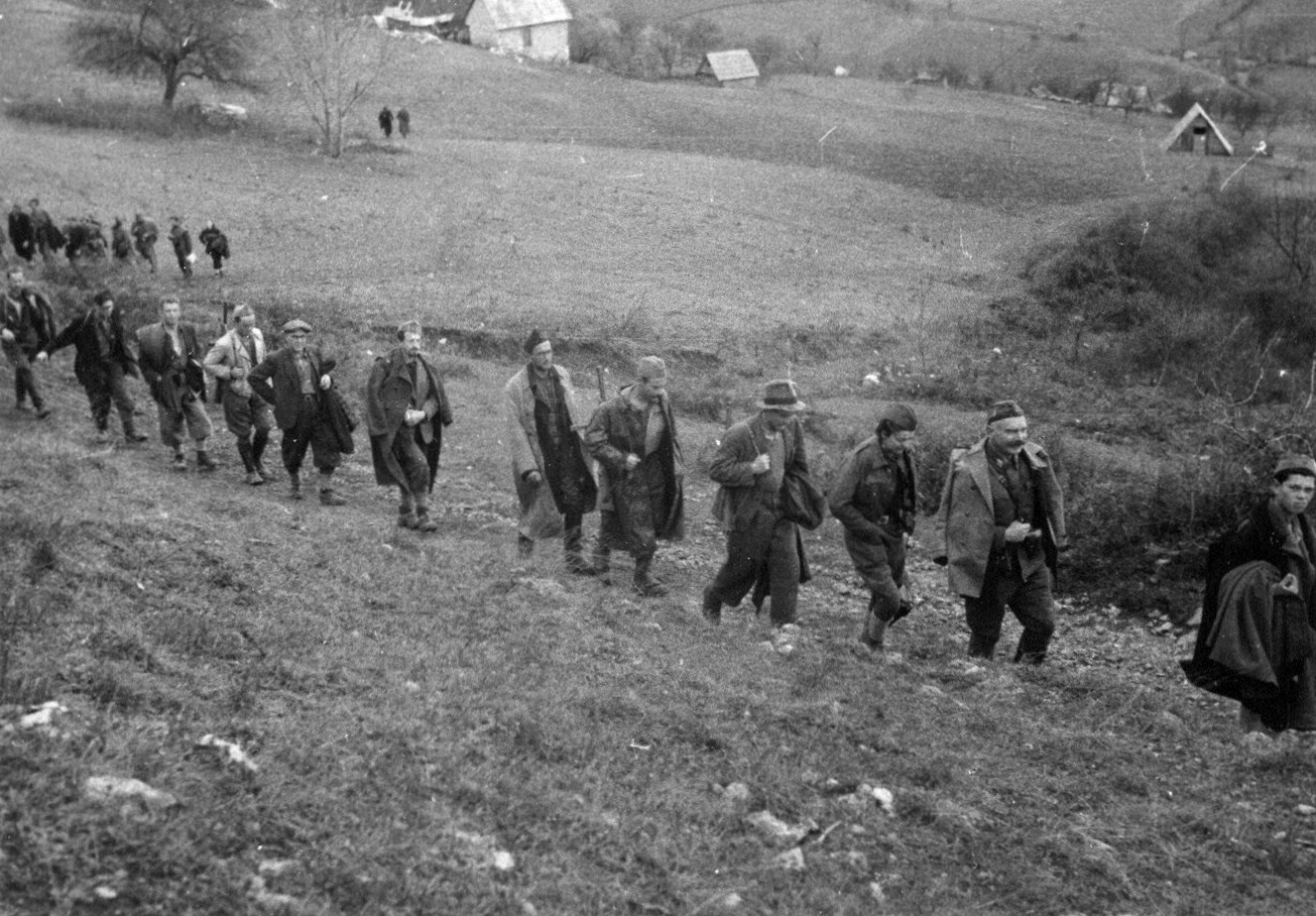 Srpskohrvatski / српскохрватски: Blizu Doljana (Lika) XI 1943. dolazak slovenačkih i hrvatskih delegata na AVNOJ.